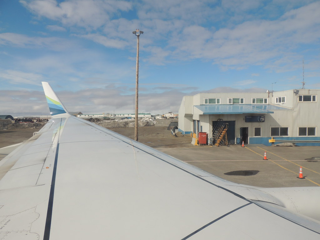 Vista del área de Deadhorse desde la plataforma del Aeropuerto